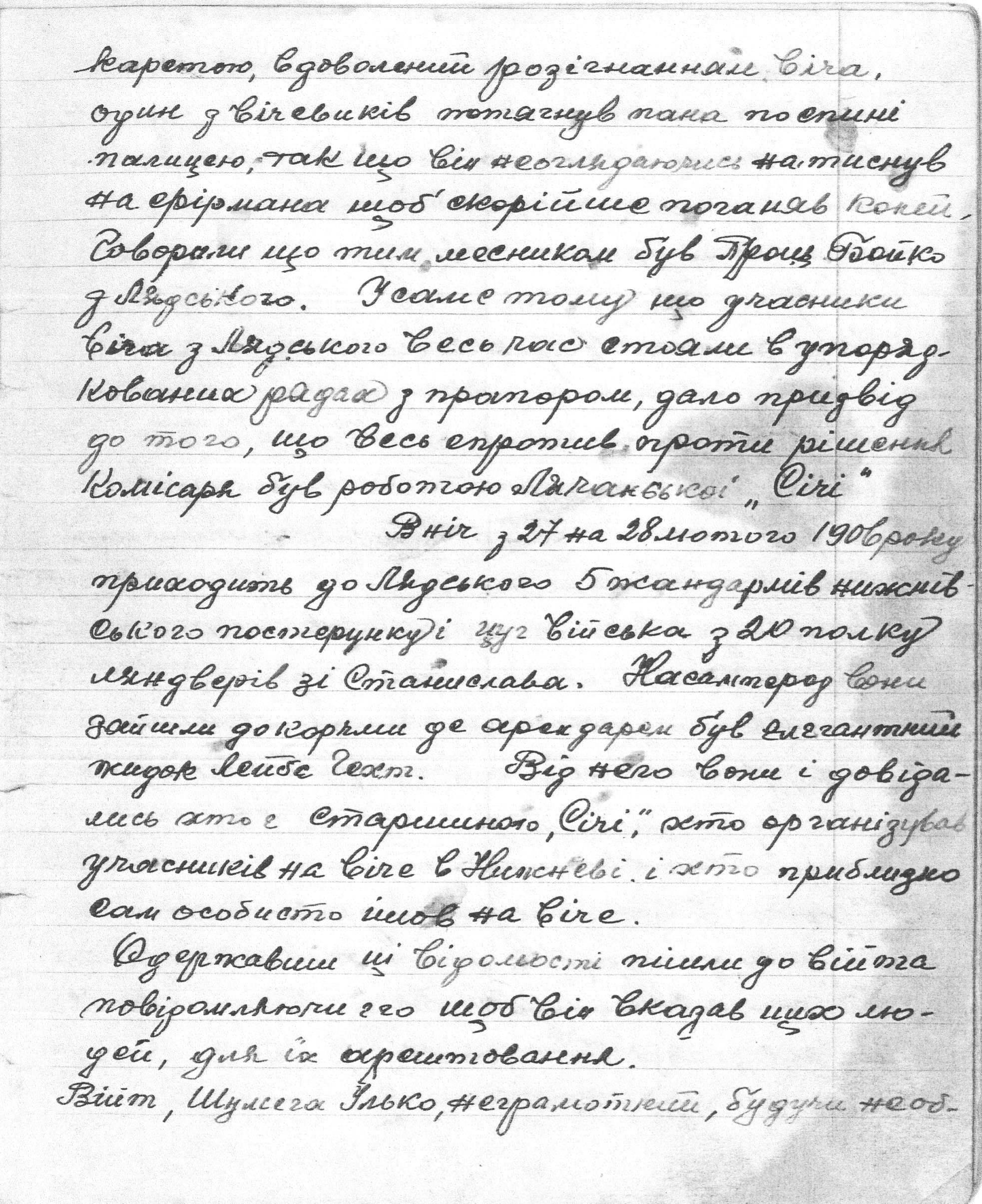 Копія рукопису